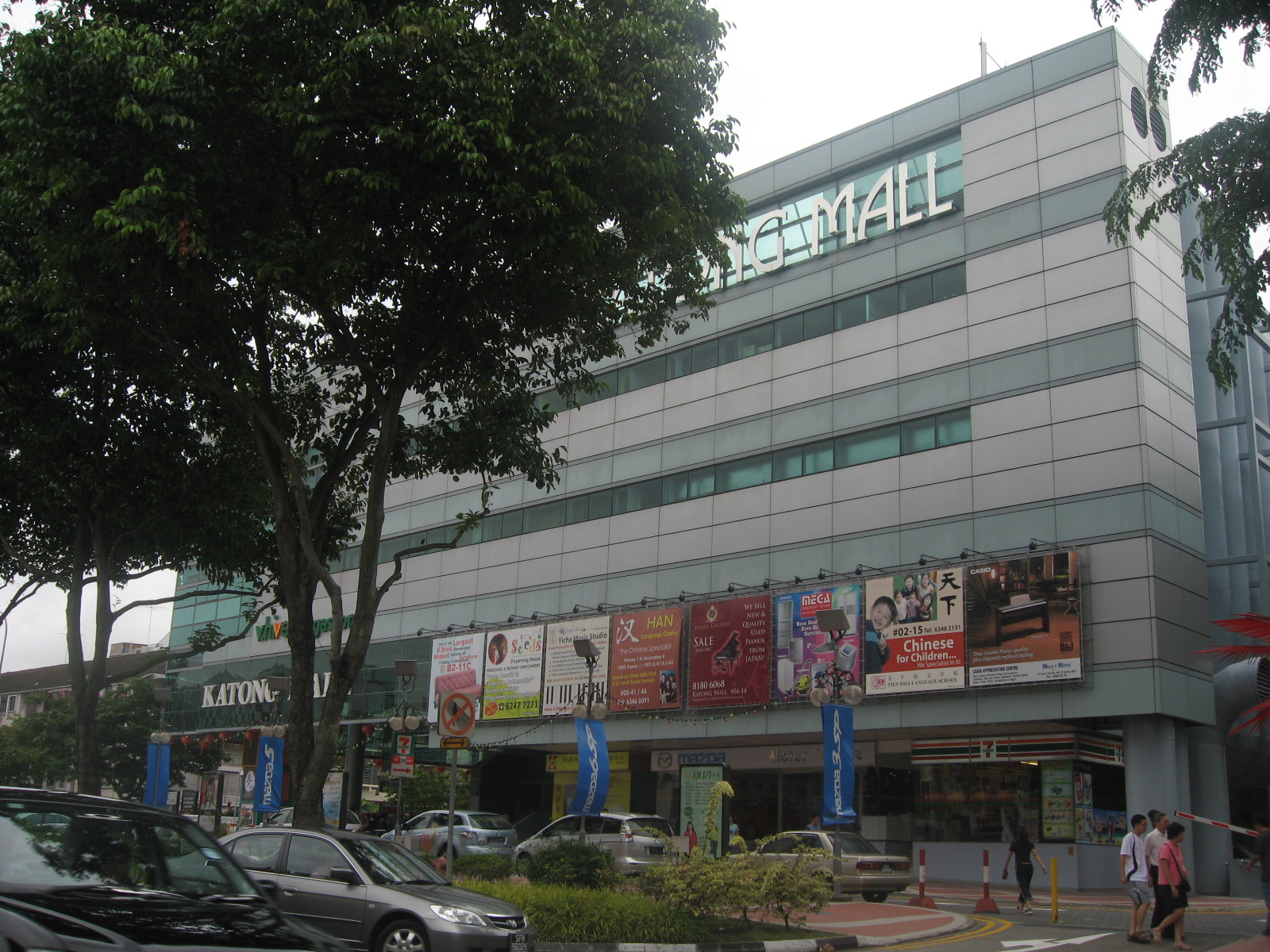 Katong Mall, Singapore.